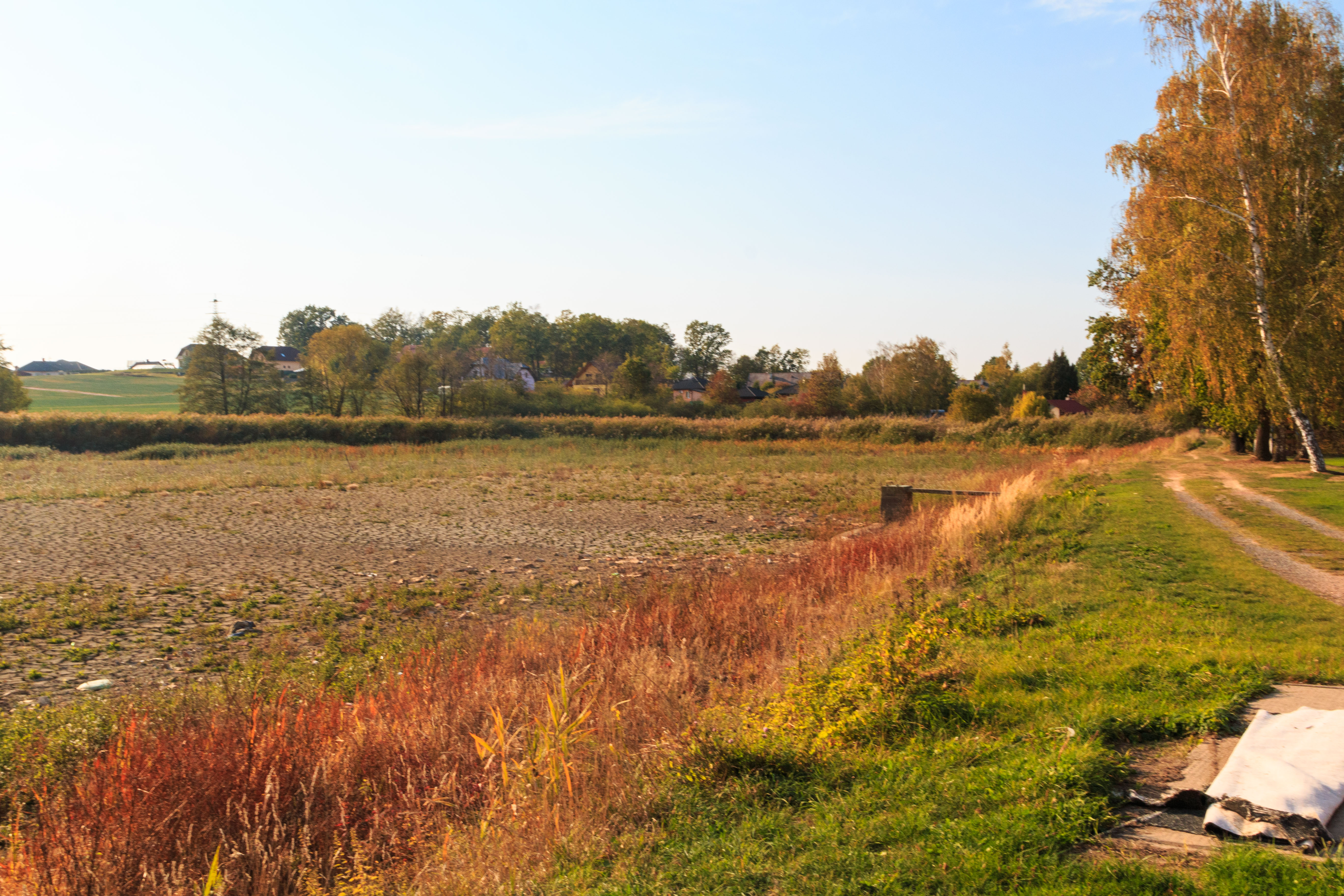 Prádelný rybník v Lukavici Project: Vodstvo Ticket: 1617.